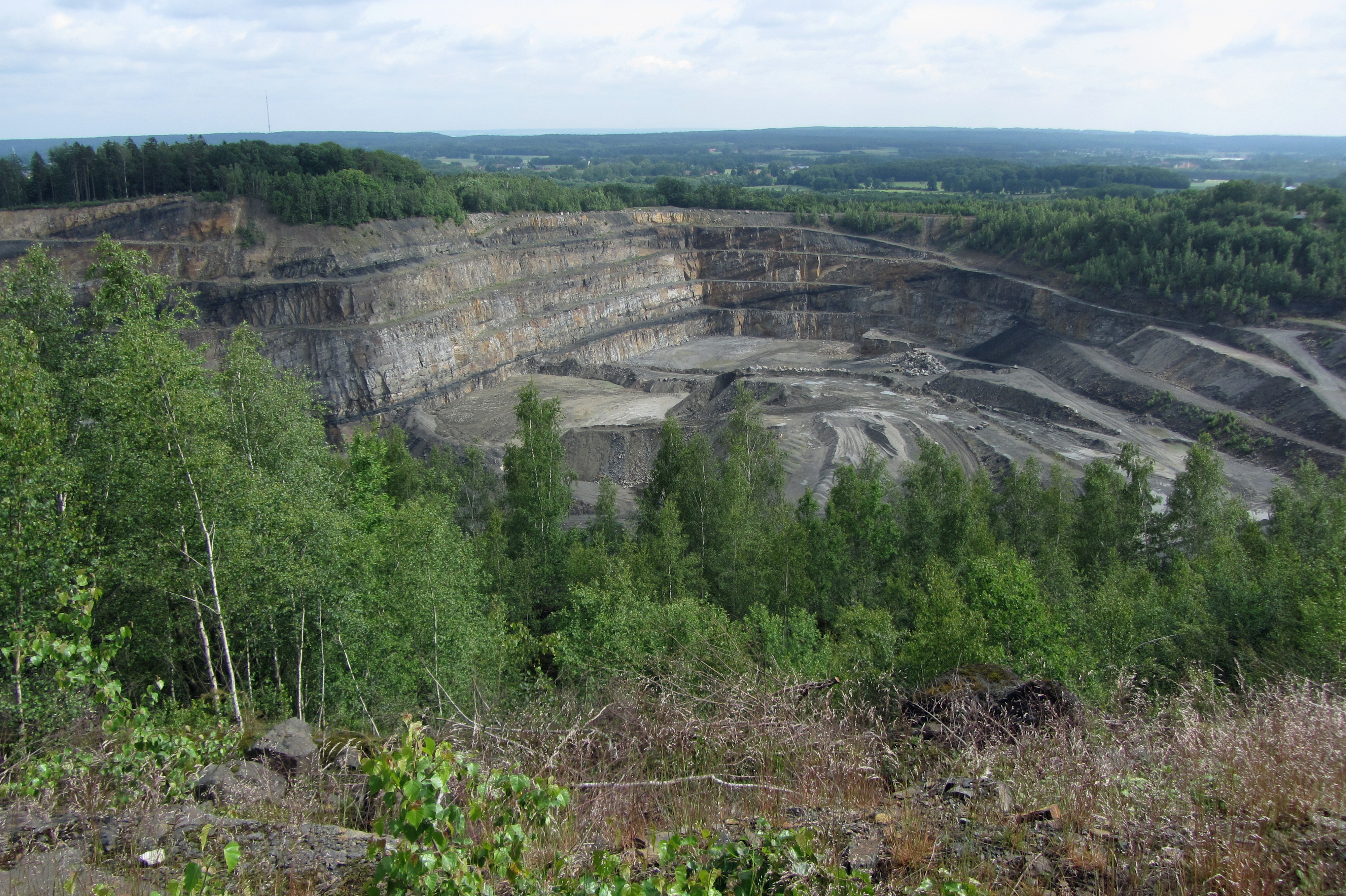 Osnabrück. Museum Industriekultur. Blick vom Piesberg auf den Steinbruch.